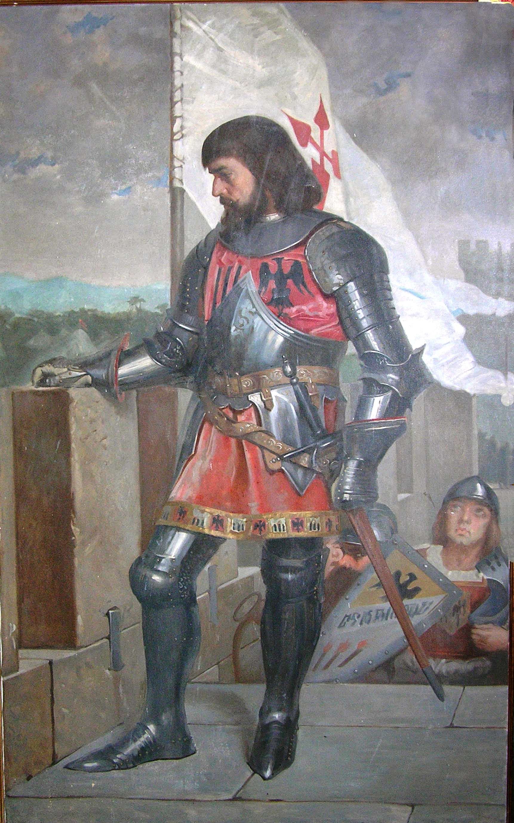 Lenzo que amosa a figura do mariscal galego Pedro Pardo de Cela. A obra é propiedade da Deputación Provincial de Pontevedra. 2,27 x 1,26 m